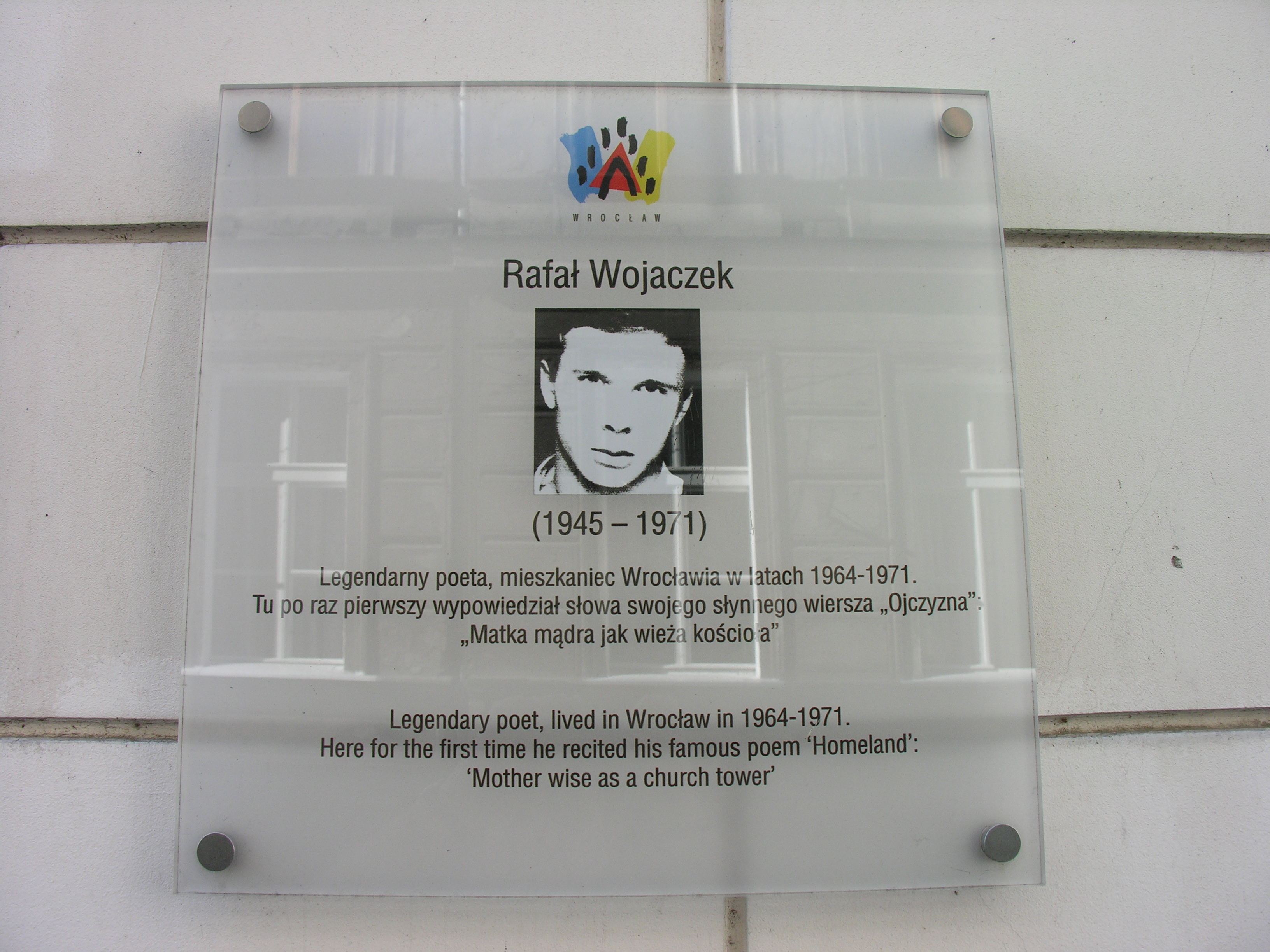 Tablica ku czci Rafała Wojaczka we Wrocławiu, ul. Rzeźnicza